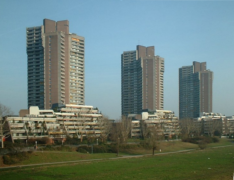 Die Hochhäuser am Neckar in Mannheim sind ein umstrittenes Wahrzeichen der Stadt seit 1975.